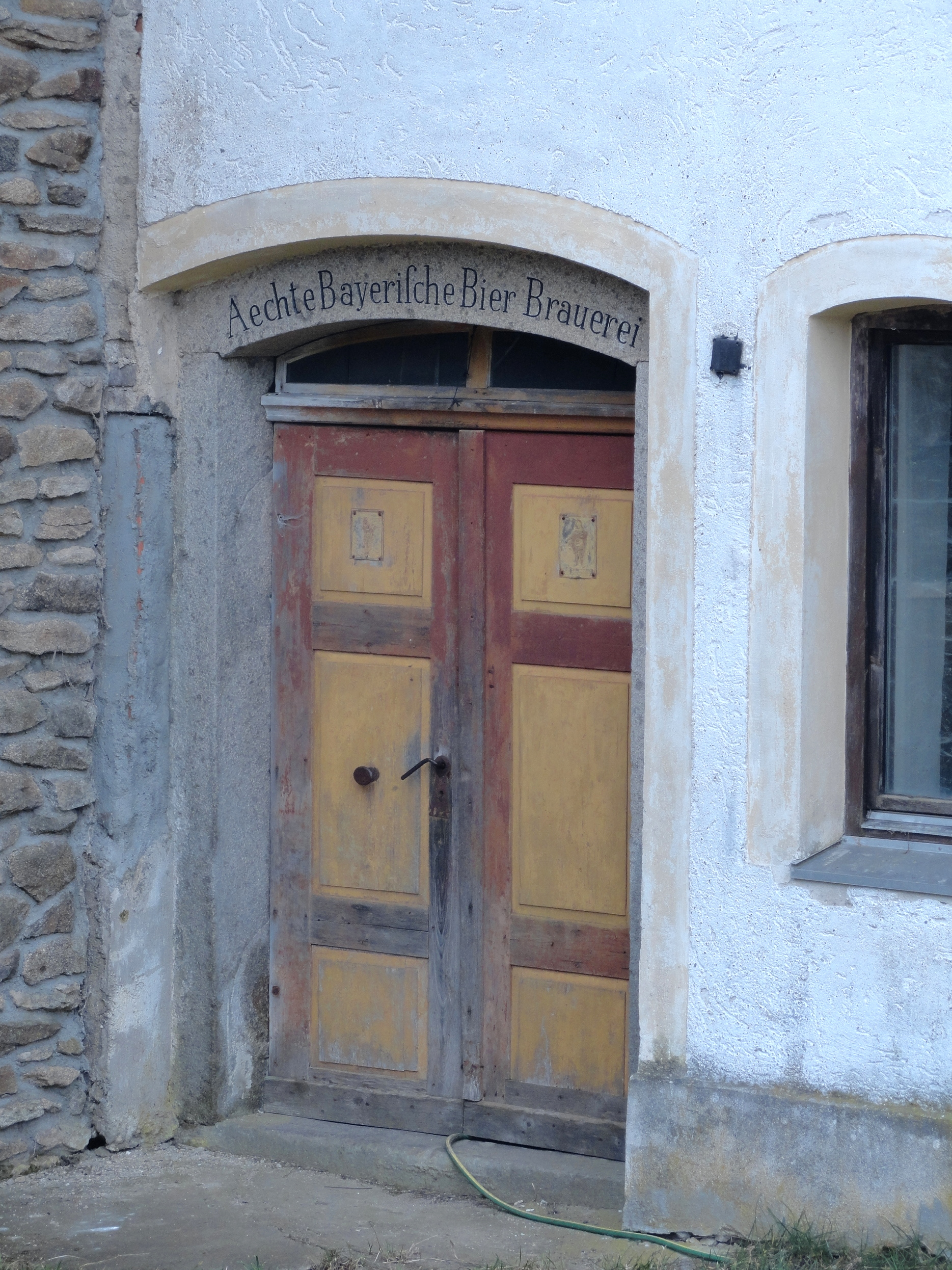 Hintereingang zur ehemaligen Brauerei in Meinstorf